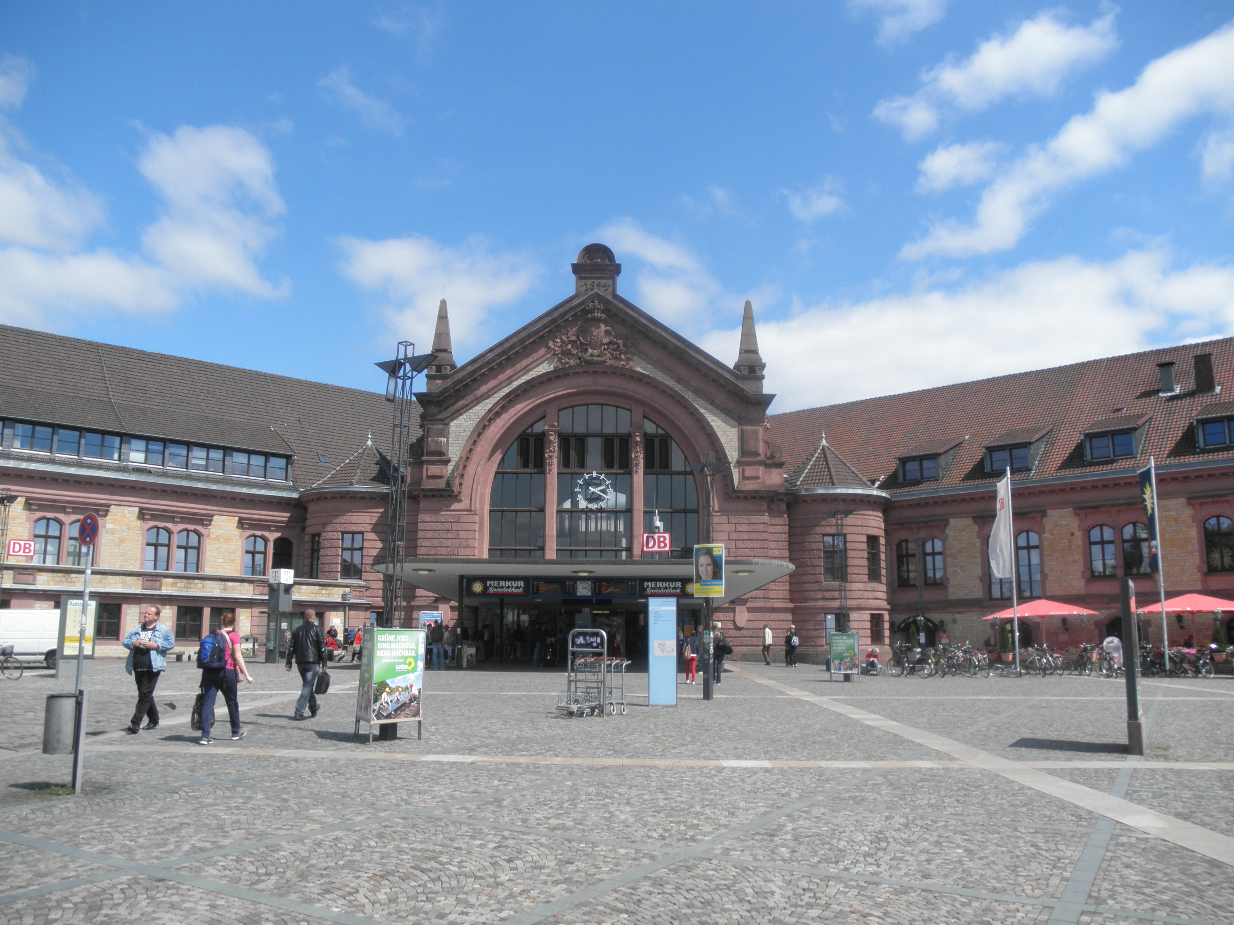 Ĉefstacidomo Osnabrück